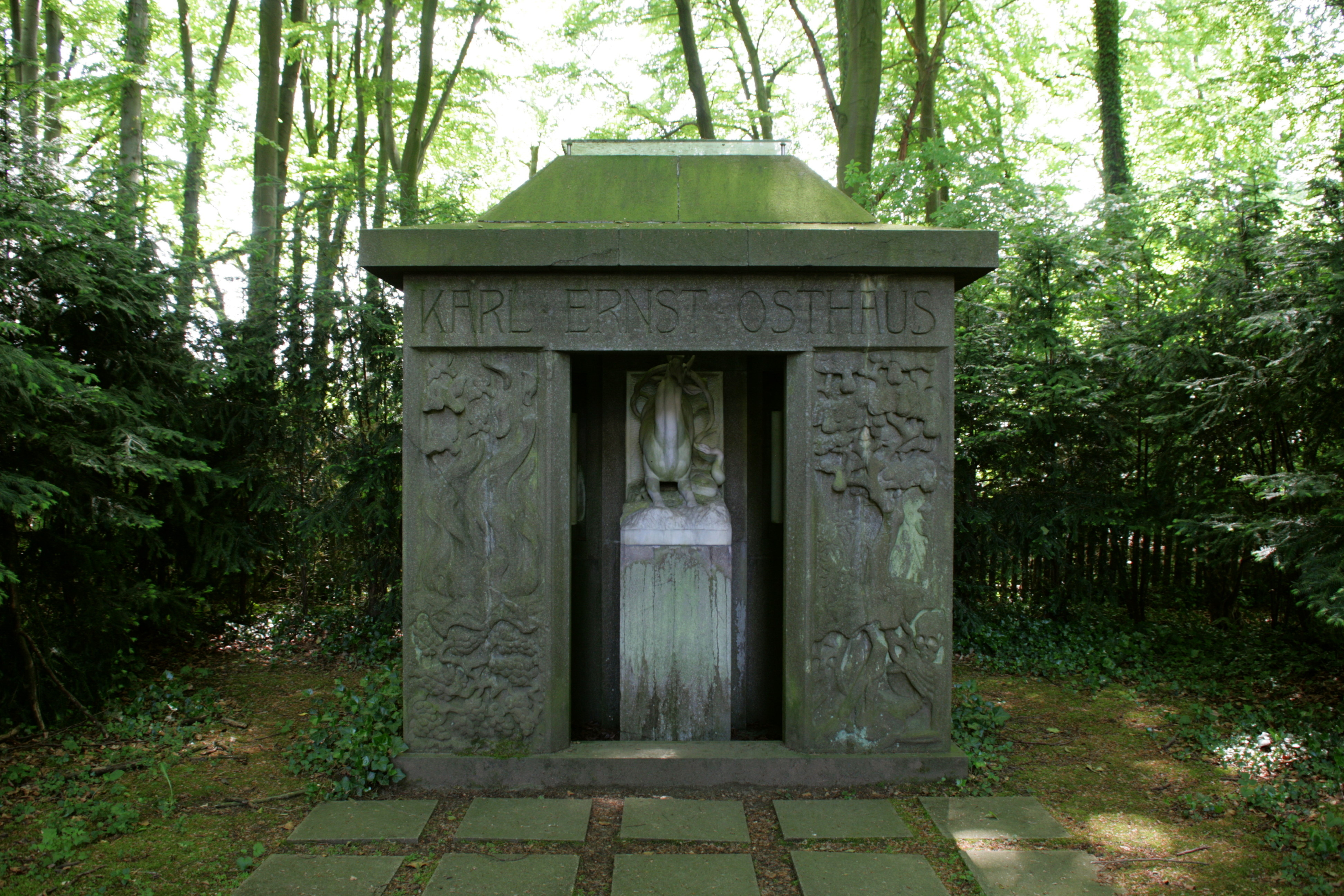 Mausoleum für Karl Ernst Osthaus im Hohenhof, Hagen